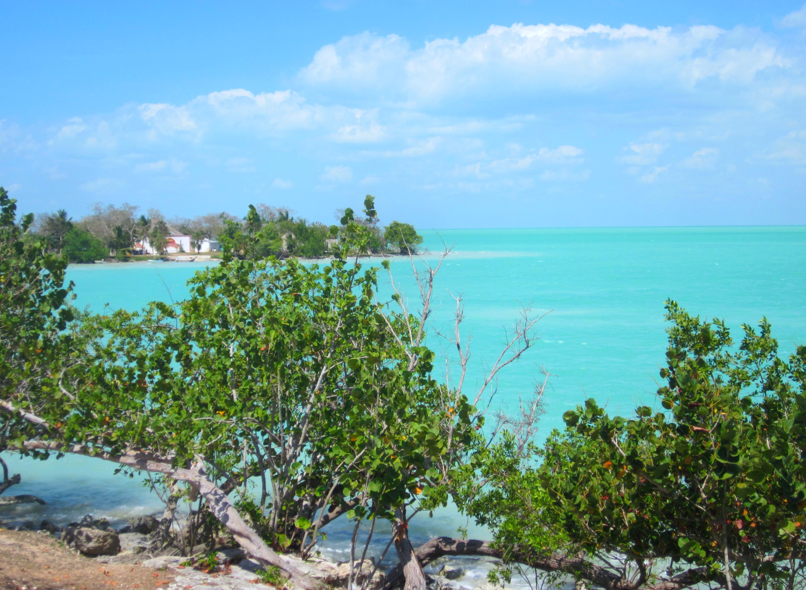 PAISAJE, CALDERITAS, Q. ROO.